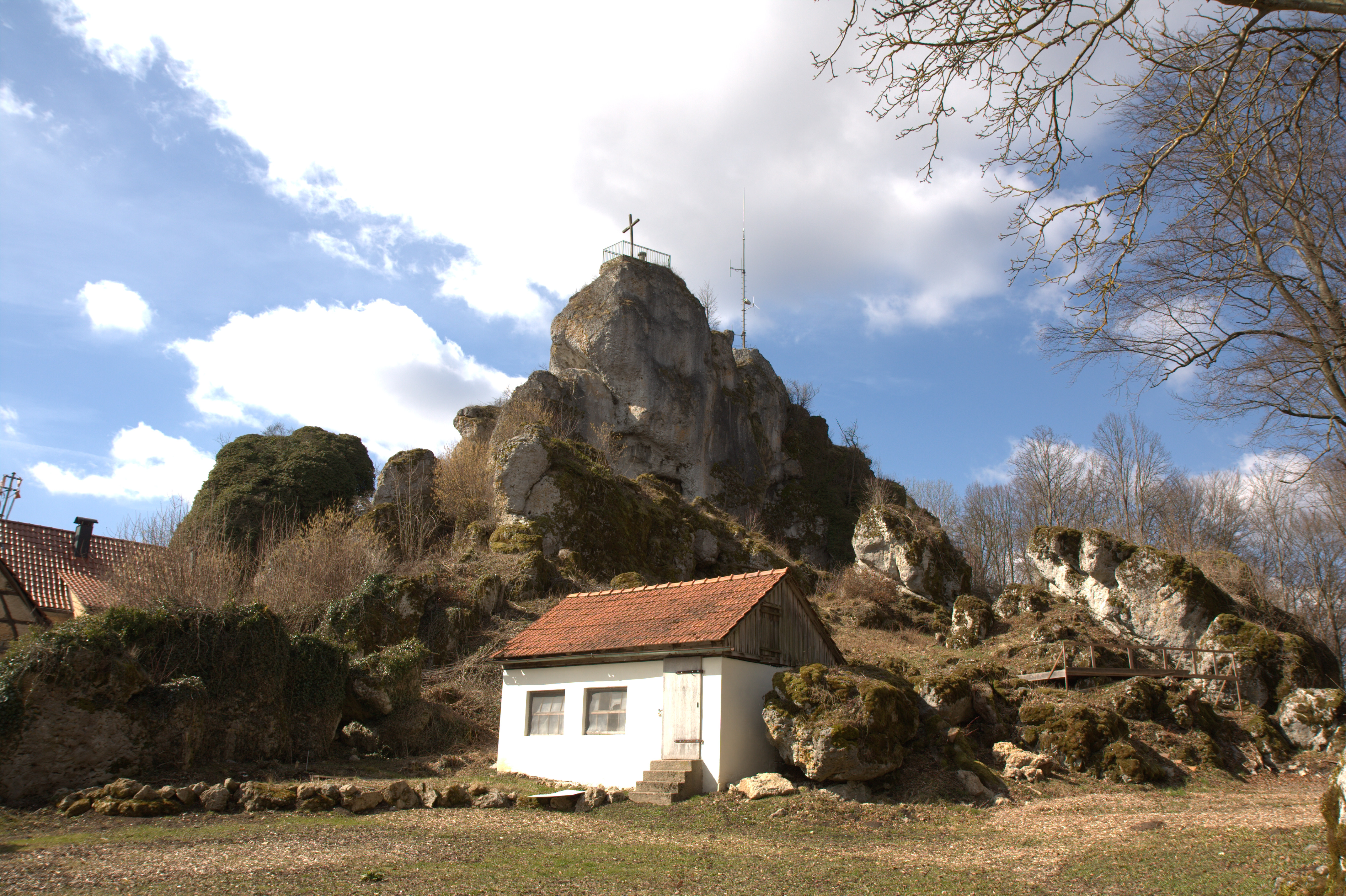 Burgstall Wichsenstein - Ansicht des Burgfelsens aus östlicher Richtung, Geotop 474R041, Naturdenkmal ND-04567